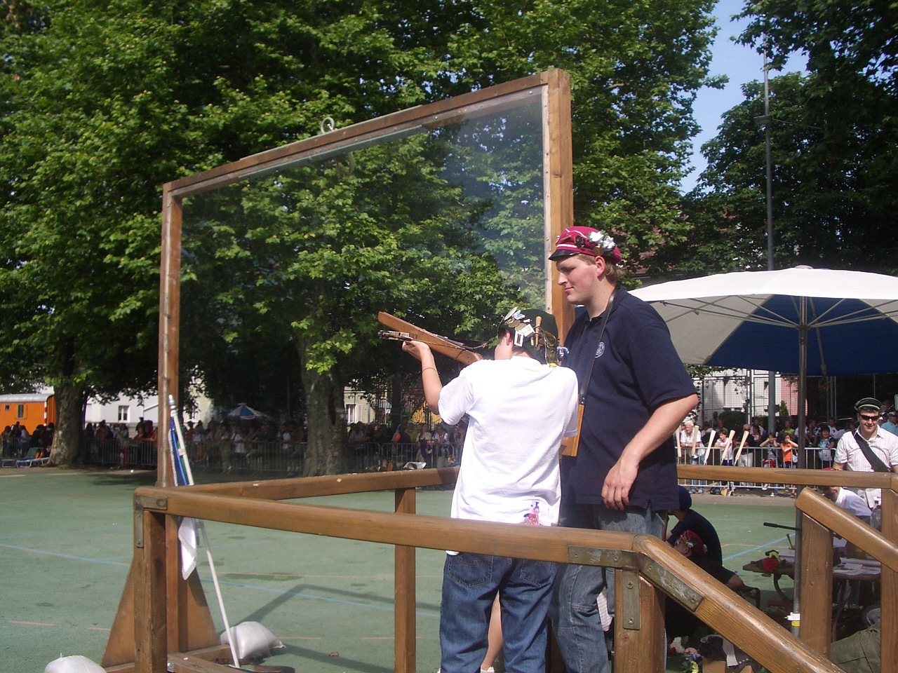 Ravensburg, Germany: Rutenfest, Adlerschießen der Jungen (Rutendienstag)